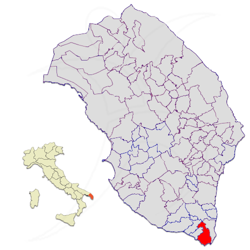 Il territorio del comune di Castrignano del Capo nella provincia di Lecce